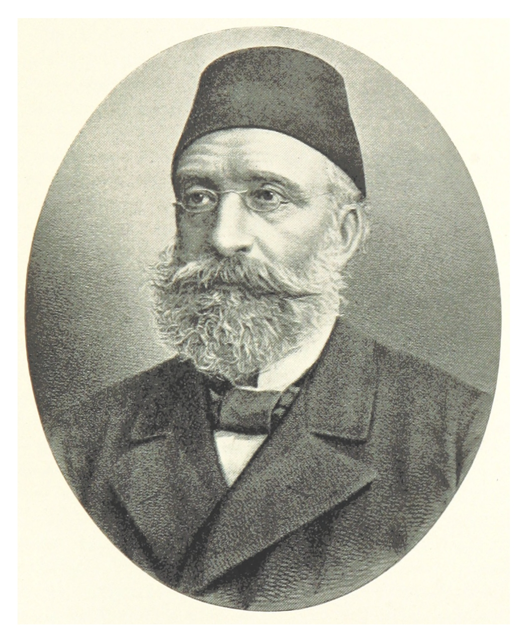 Ahmed Şefik Midhat Paşa